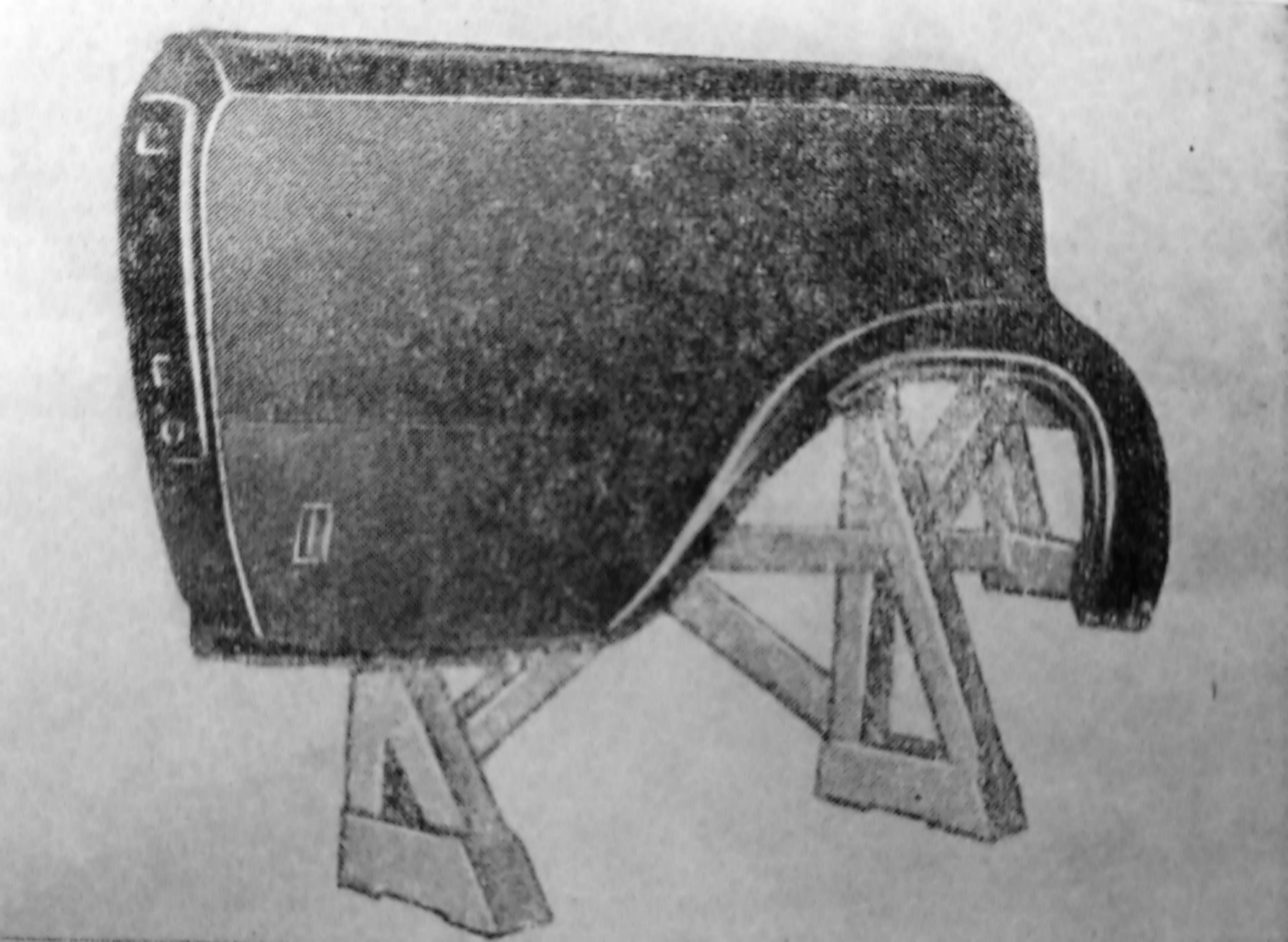 Model wzorcowy wytłoczki tylnego błotnika PF 125p kombi